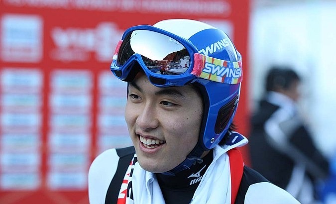 Oficjalne treningi mężczyzn na skoczni K-120 przed konkursem indywidualnym mężczyzn podczas Mistrzostw Świata w Narciarstwie Klasycznym 2013